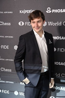 Турнир Претендентов 2018, Сергей Карякин